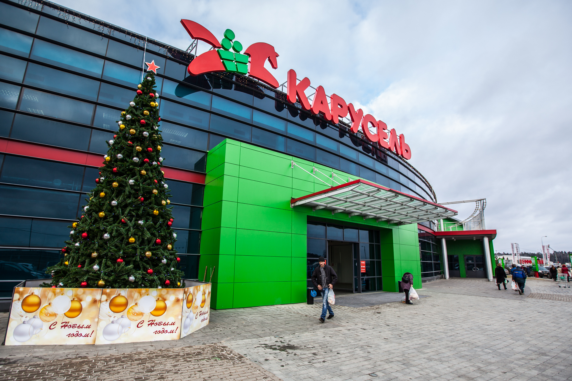 Гипермаркет «Карусель» на Новорижском шоссе открыт в 2015 г.